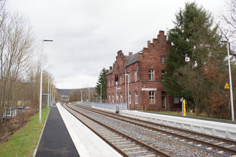 Bahnhof Gamburg (Tauber) mit den beiden Gleisen und Bahnsteigen. Im Hintergrund rechts ist das ehemalige Empfangsgebäude zu sehen (heute im Privatbesitz. Das Gebäude wird unter Ferienwohnung Bahnhof Gamburg vermarktet und hat mit der Eisenbahn nichts zu tun. ) Die Bahnstelle liegt an der Taubertalbahn Abschnitt: Lauda-Wertheim.